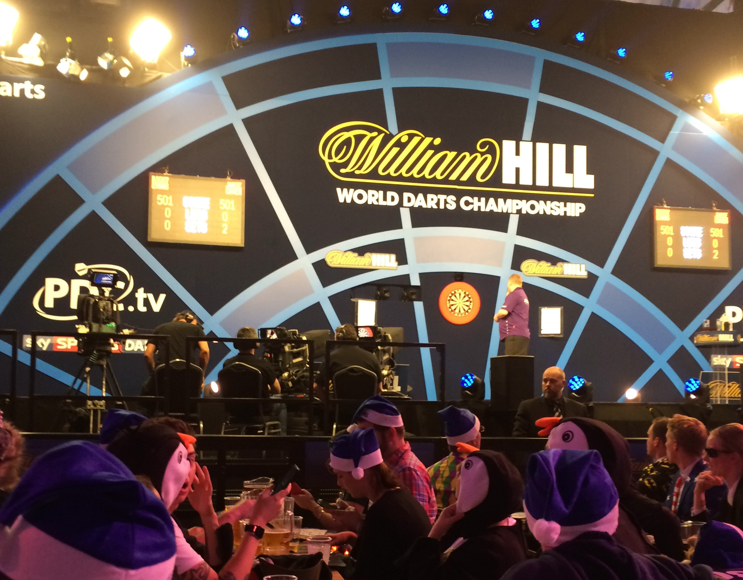 PDC World Darts Championship 2016 Abendsession vom 26. Dezember 2015